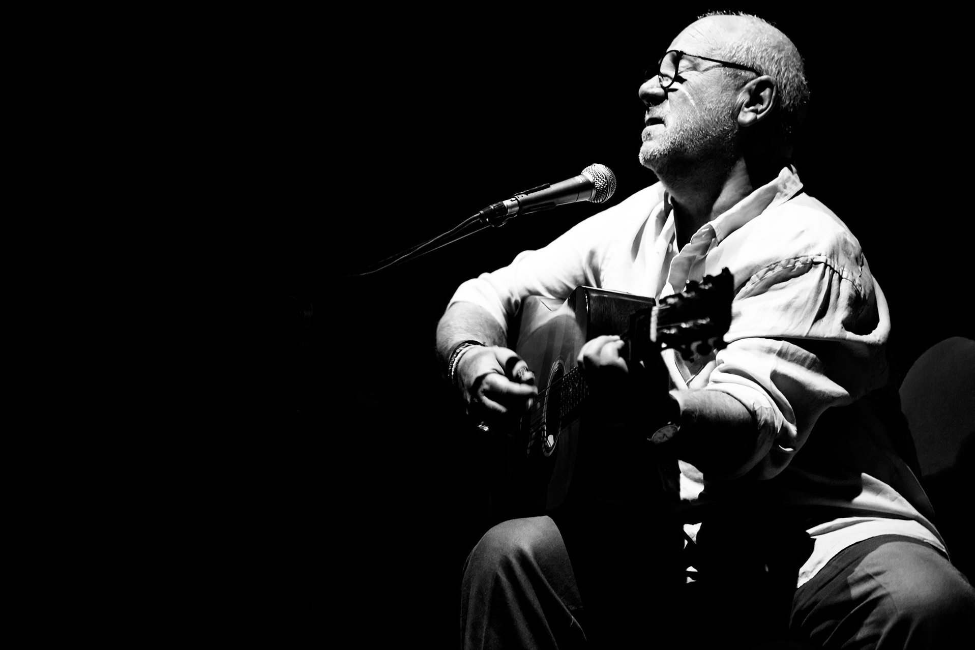 İzmir Kültürpark Açıkhava Bülent Ortaçgil konserinden.